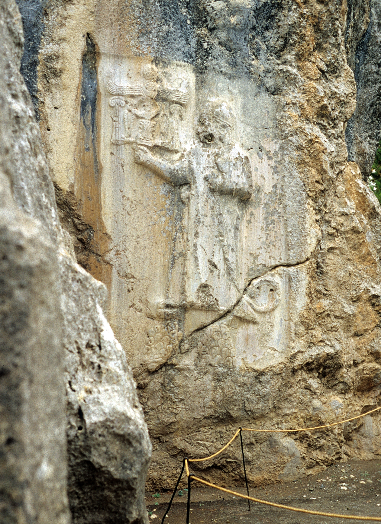 Yazilikaya, hethitisches Heiligtum bei Hattusa, Türkei, Kammer A Tudhalija IV.